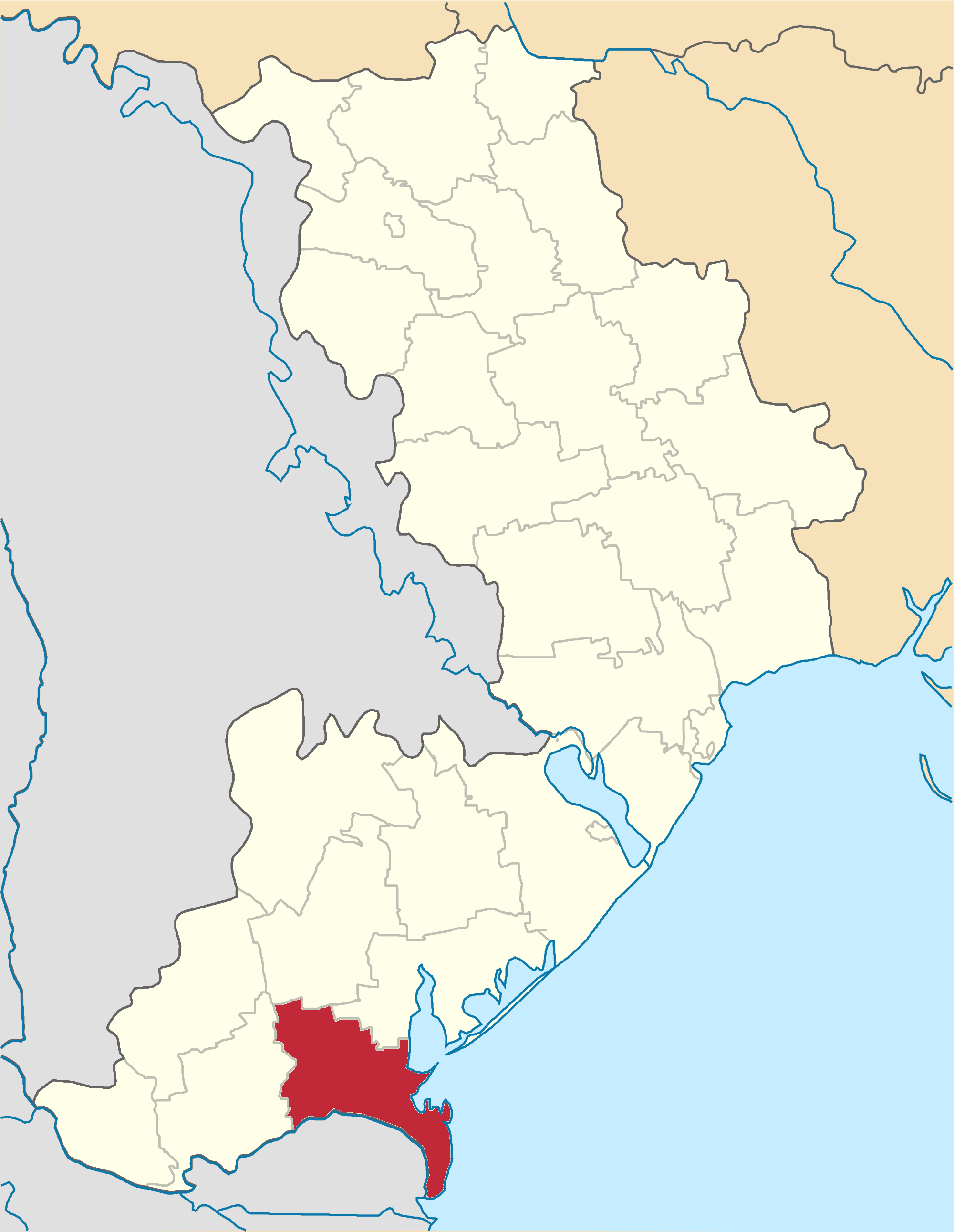 Kiliyskyi-Raion map